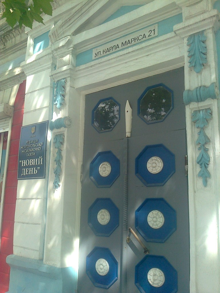 Мелитополь